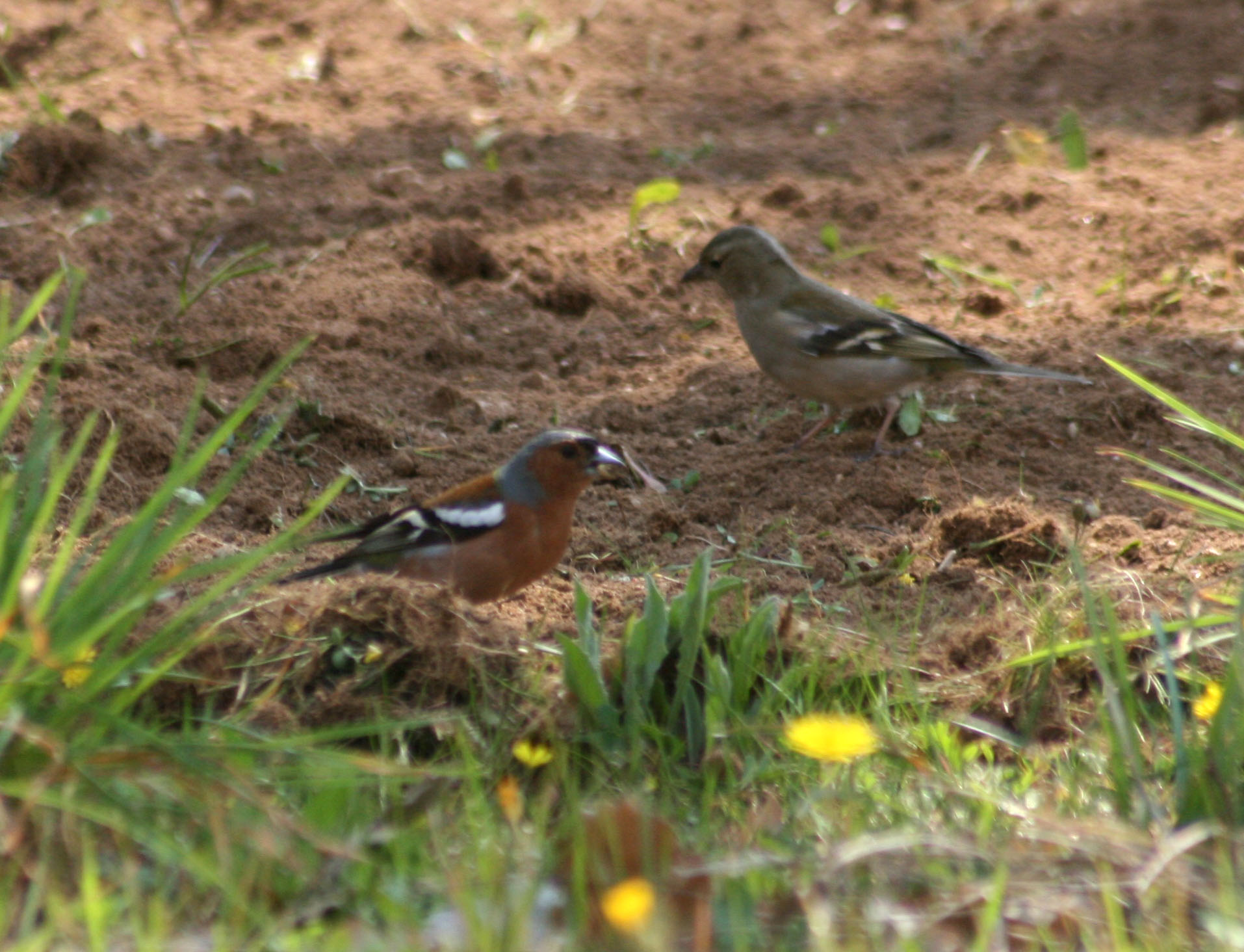 Pinsons couple Fringilla coelebs Ardeche France